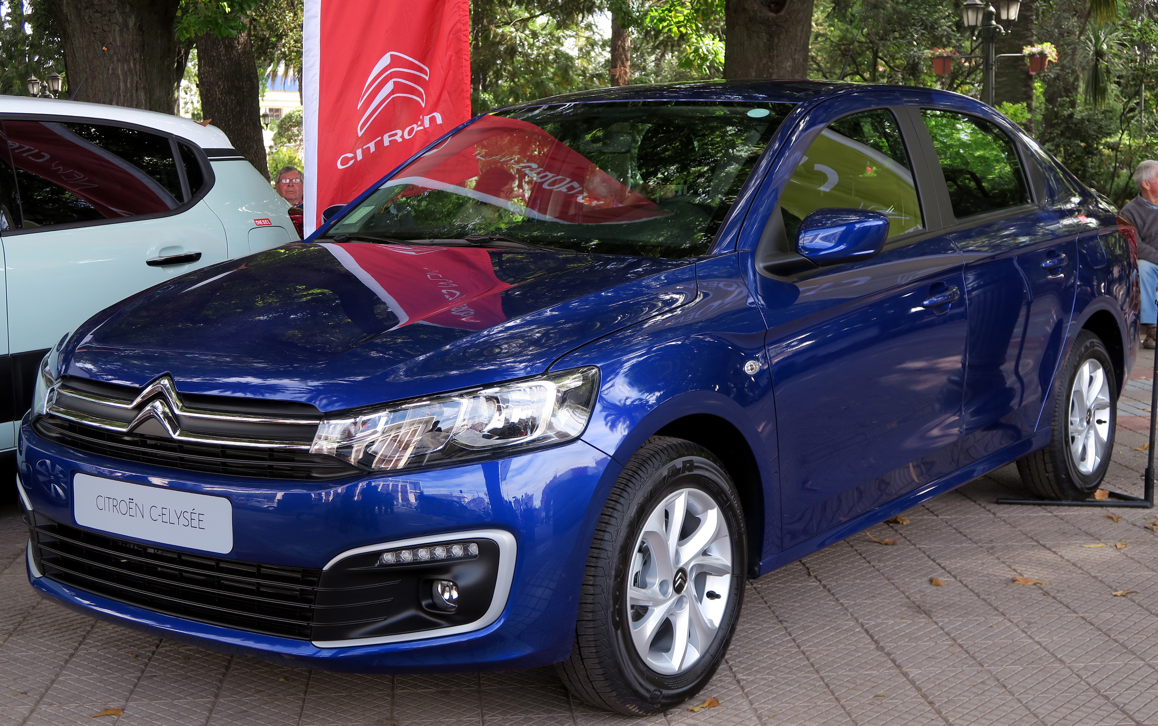 Citroen C-Elysee Feel 2018